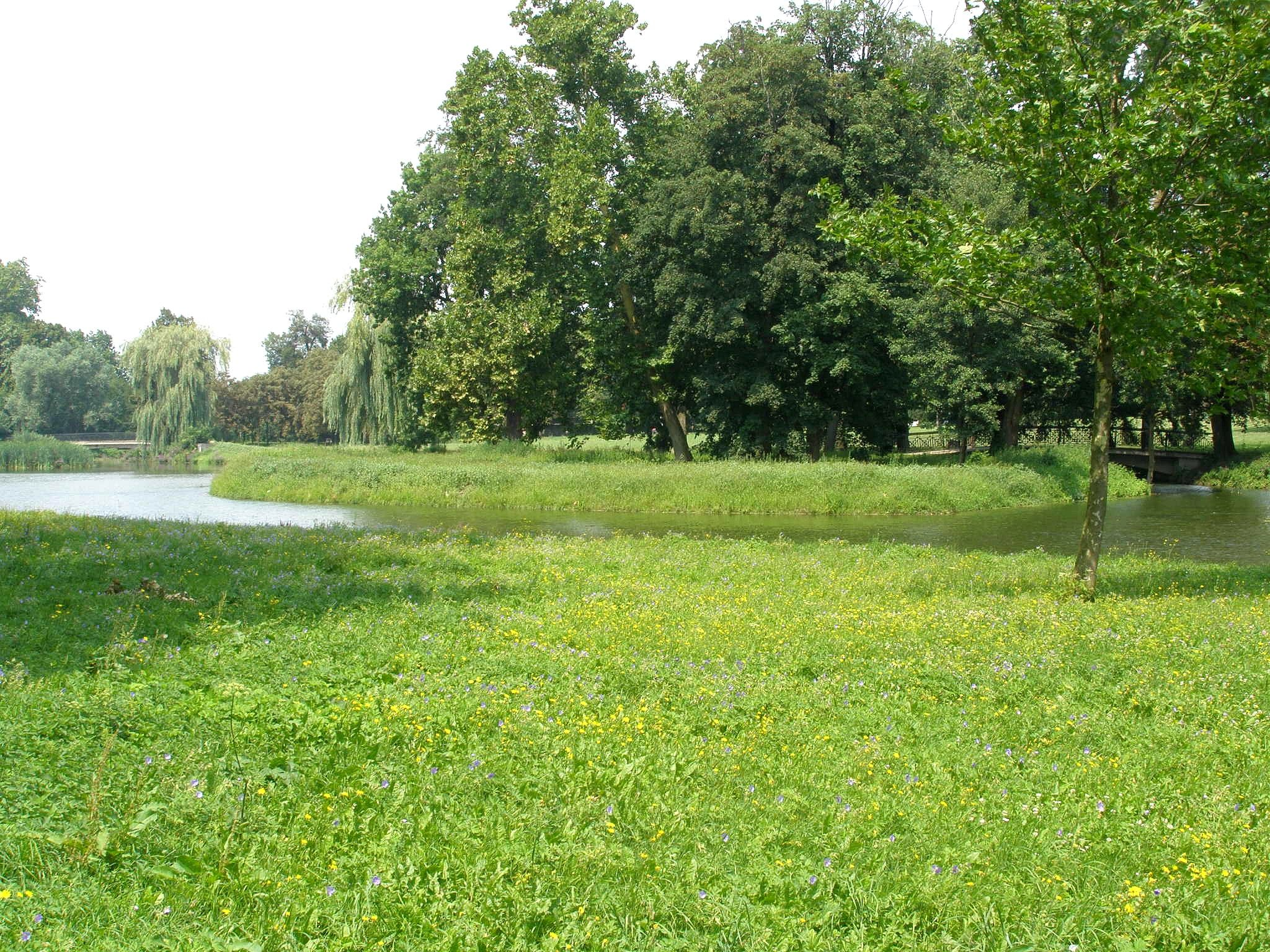 Park za kaštieľom